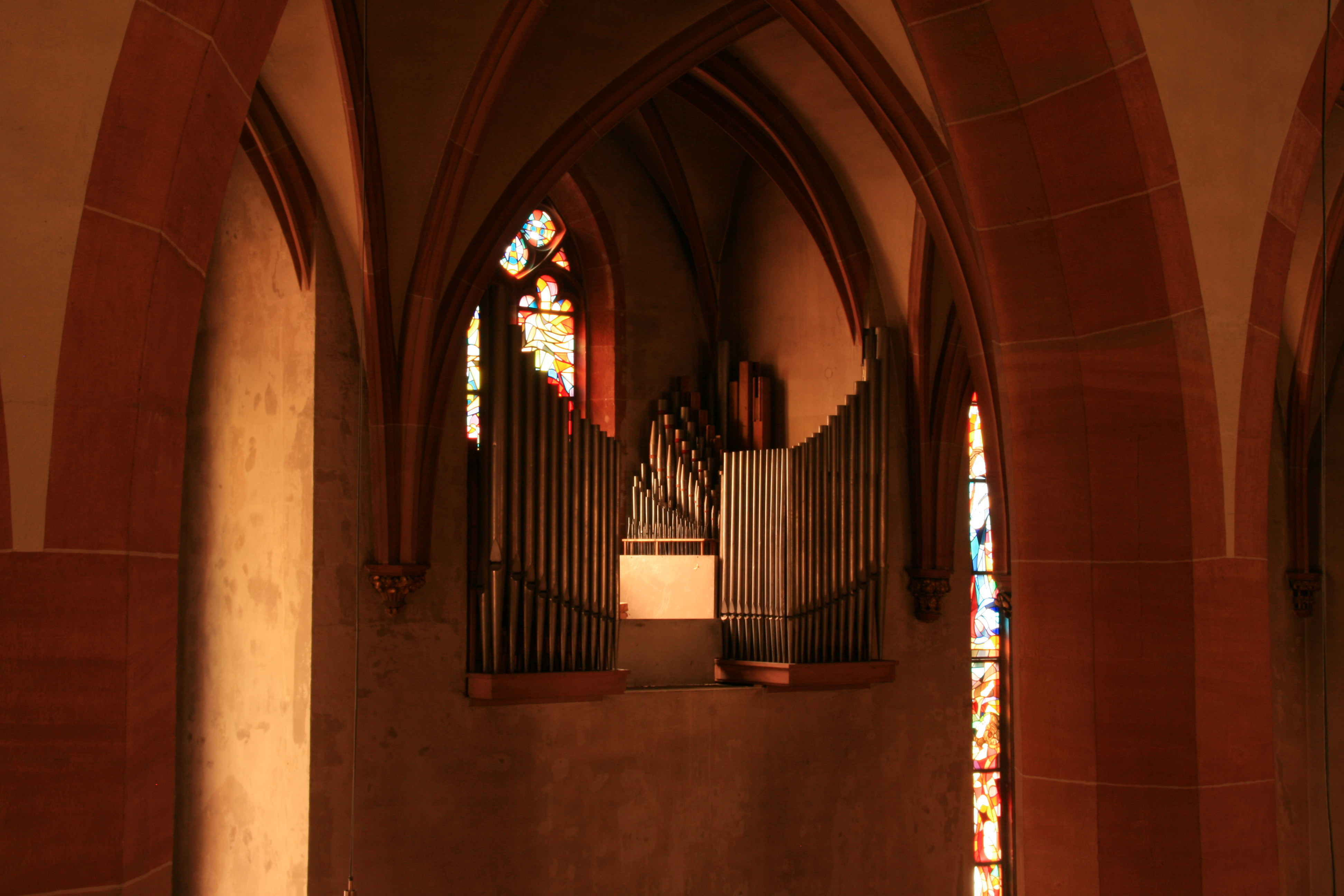 Das Fernorgel (sog. Evangelienorgel) der Stiftskirche Baden-Baden, erbaut 1954 von der Fa. Carl Hess Durlach